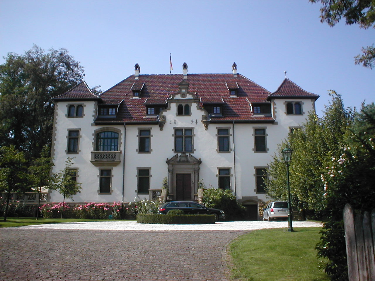 Schloss Babstadt, erbaut 1898